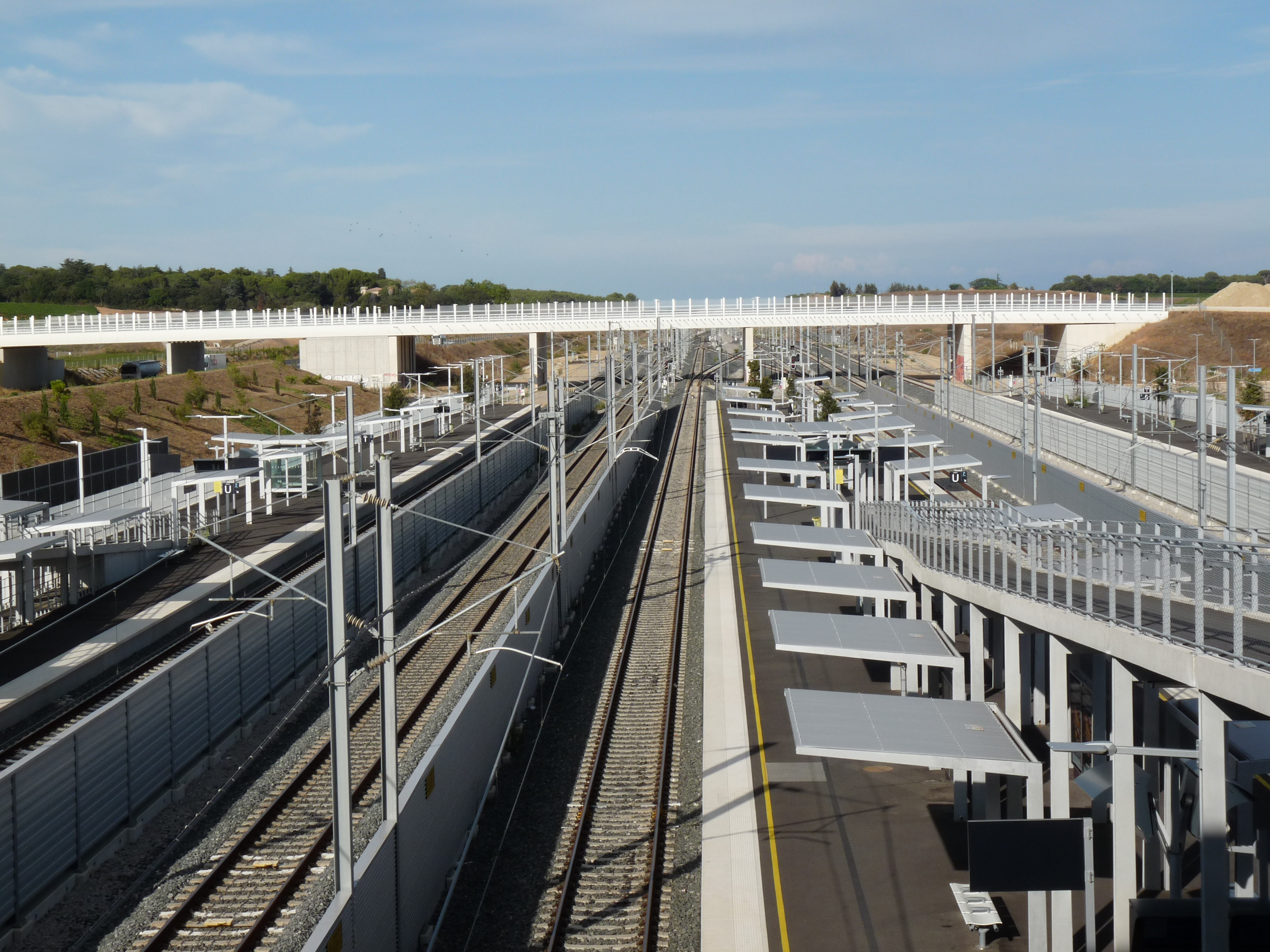 Het station van Montpellier-Sud-de-France gezien richting Noordoost